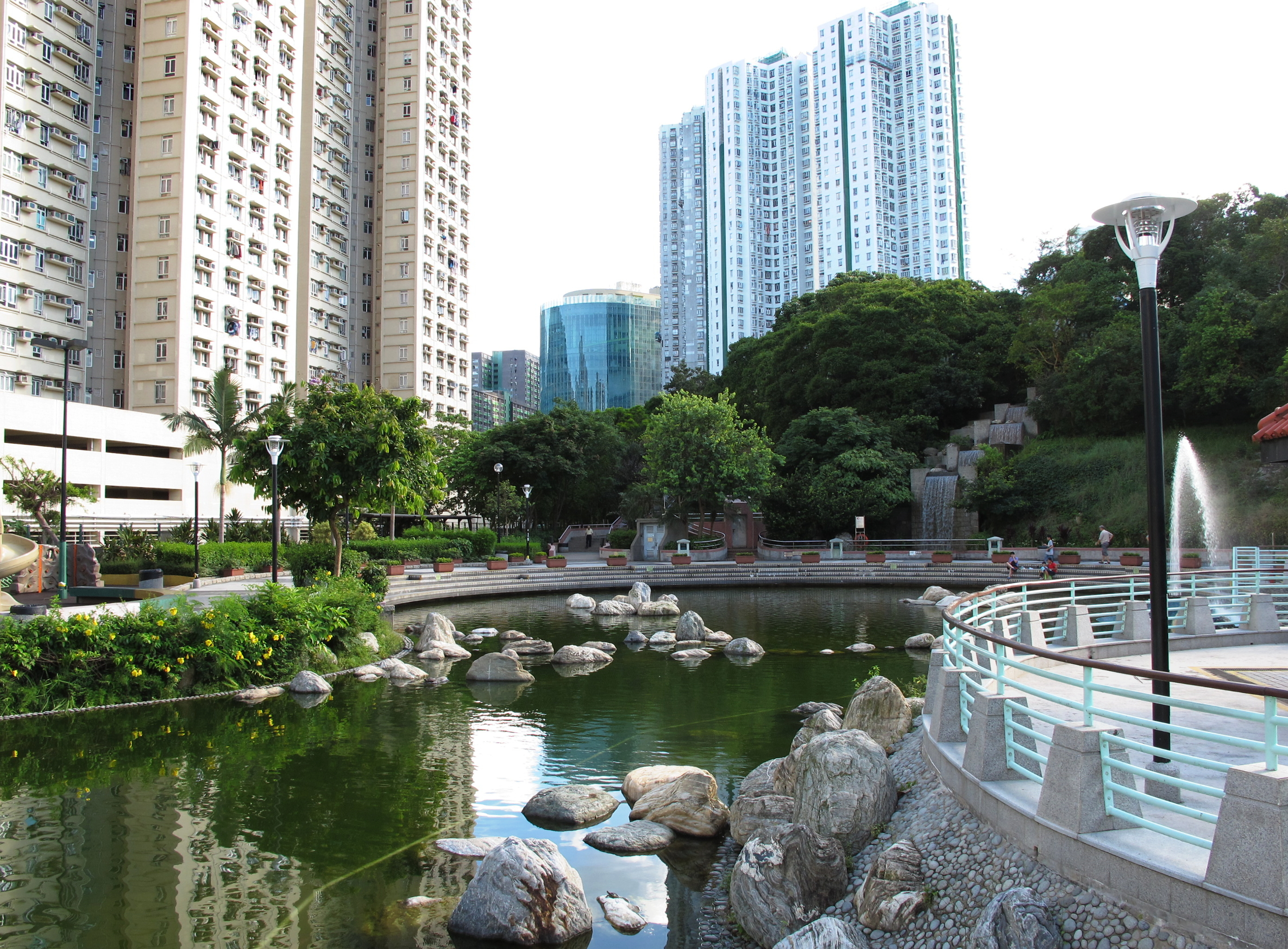 Chai Wan Park 柴灣公園